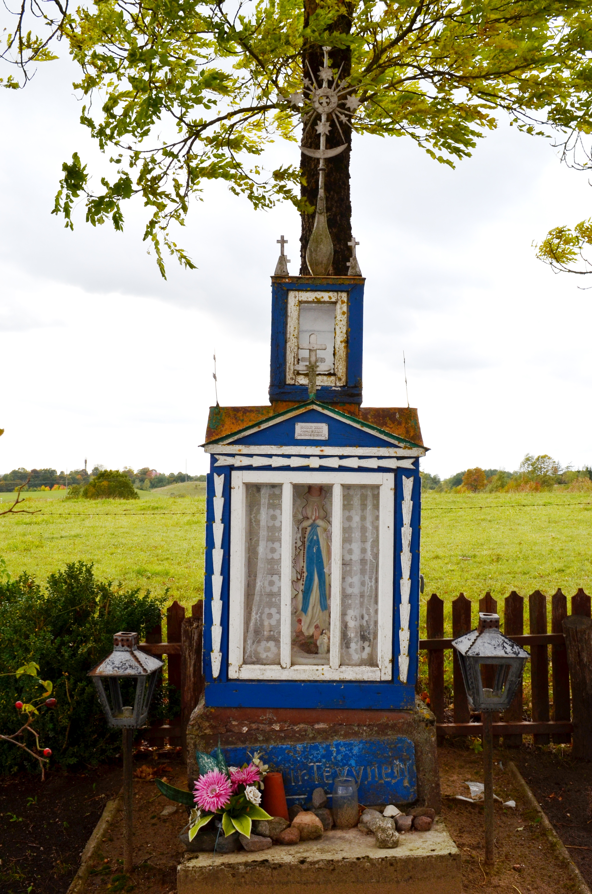 Koplytėlė, Lopaičiai, Rietavo sav.